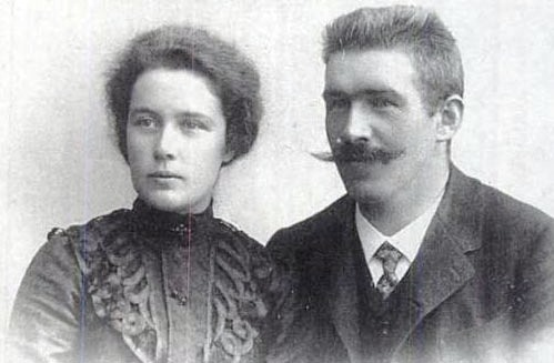 Verlobungsbild von Clara und Karl Koller